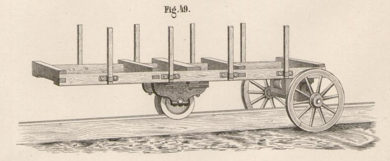 Eisenbahnsystem Lo-Presti - Wagen (cropped and retouched)